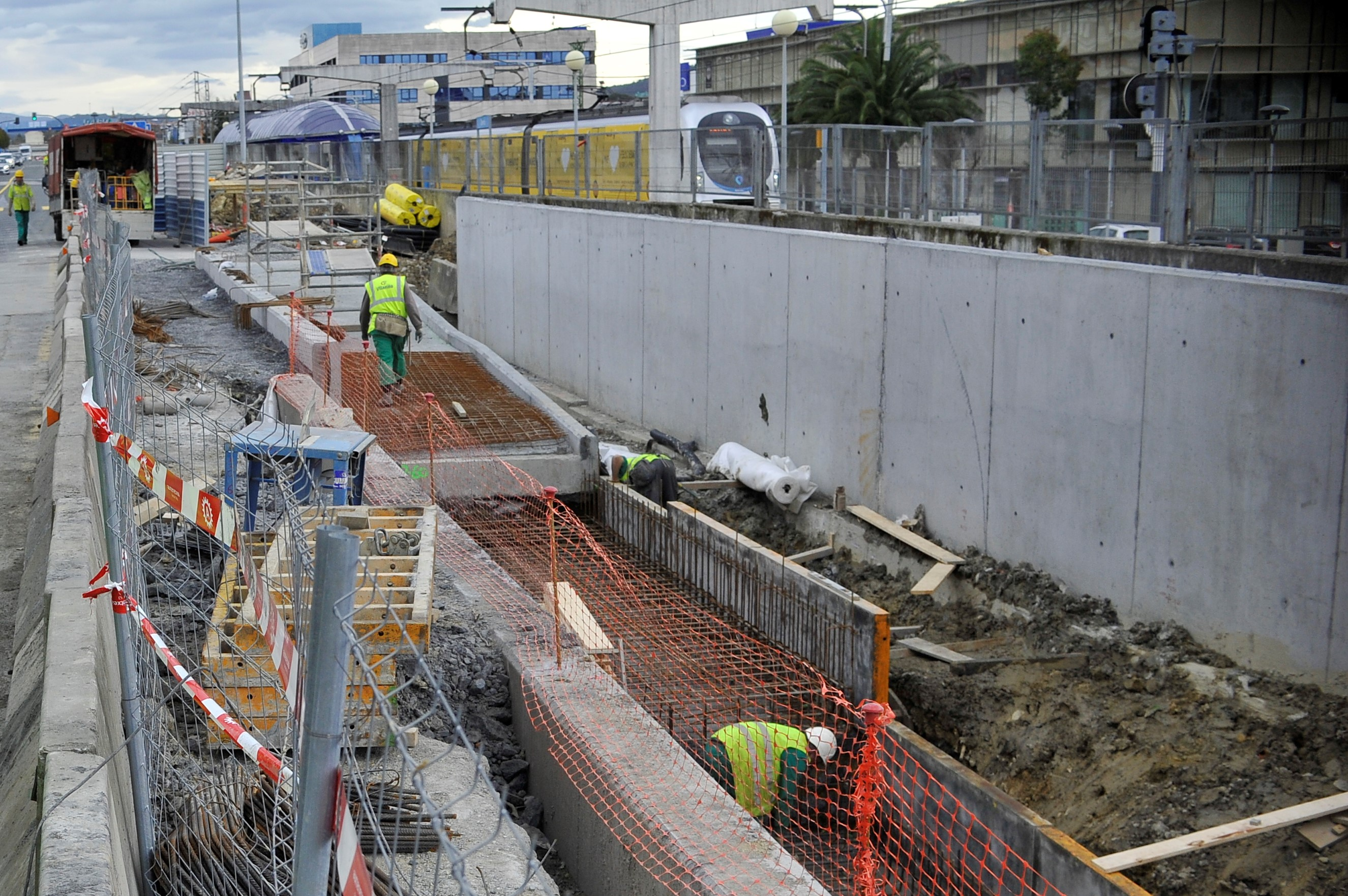 Obras en la estación de Derio (2018)